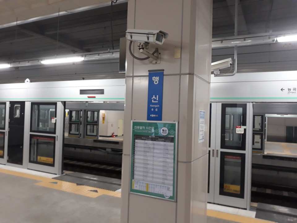 행신역 승강장